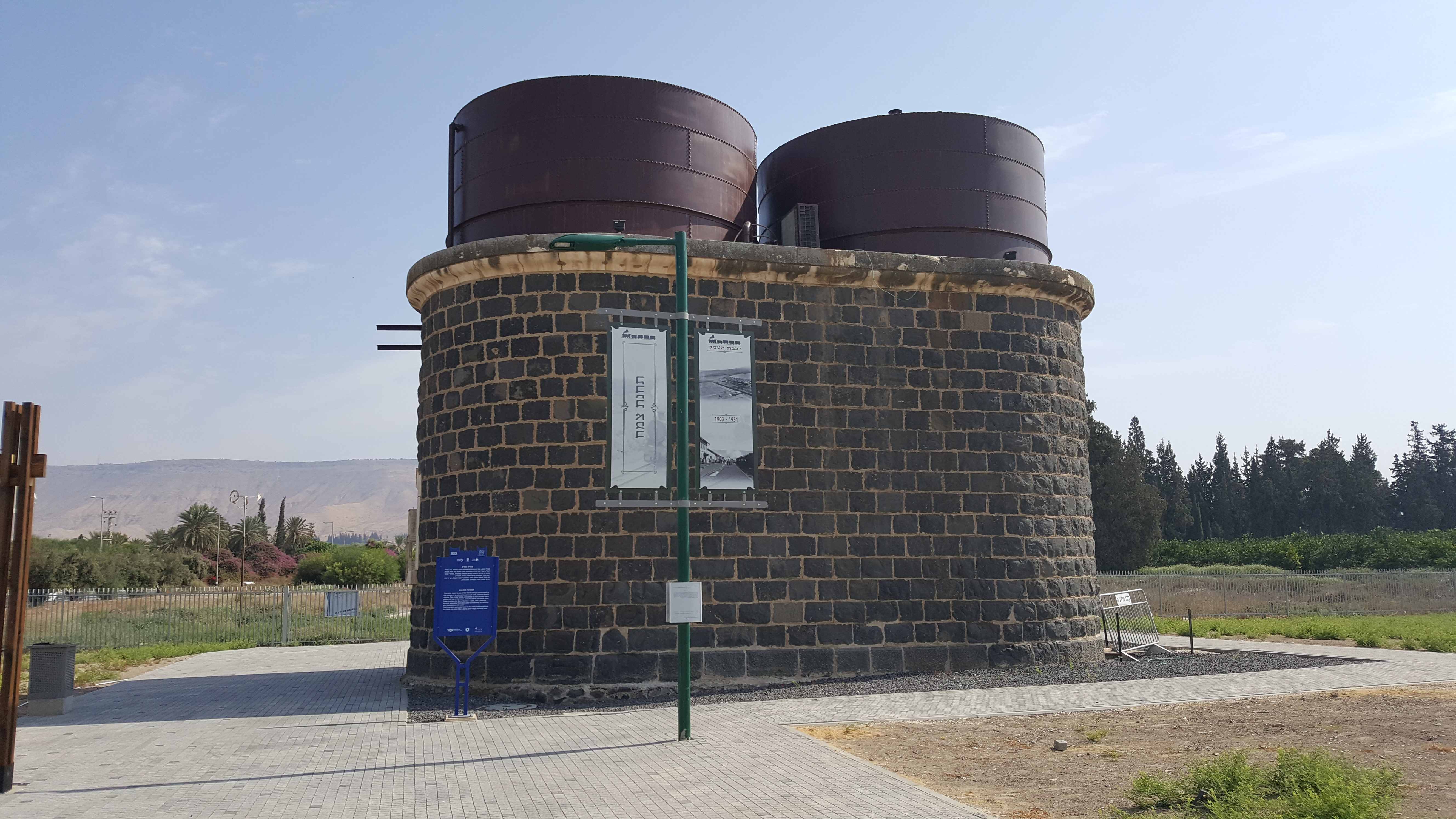 תחנת הרכבת סמח' הייתה תחנת הרכבת של העיירה הערבית סמח' (سمخ) שהייתה בדרומה של הכנרת עד למלחמת העצמאות. התחנה היא שריד לרכבת העמק שהוקמה על ידי הסולטאן הטורקי עבדול חמיד השני במטרה לקשר את העיר דמשק עם חוף הים התיכון. שרידי התחנה מצויים כיום במרכז האזורי צמח מדרום לכביש 92 בקטע מ"צומת צמח" ל"צומת מעגן".